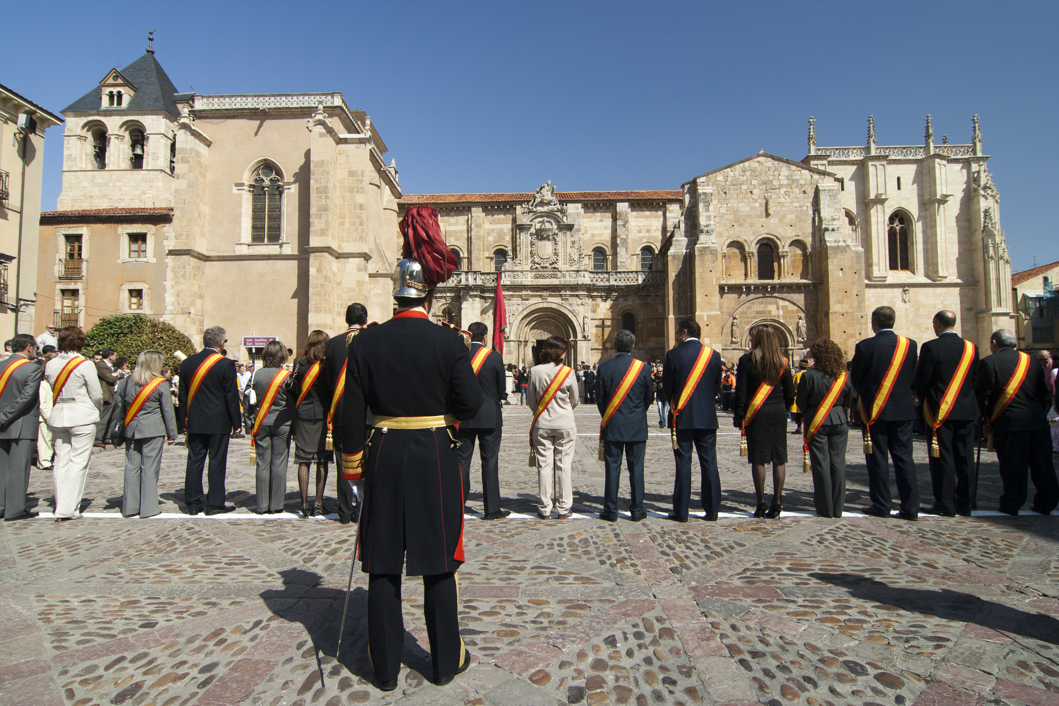 Fiesta de Las Cabezadas, León, España. Abril 2008. This is a photography of a Folklore festival in Spain (Wikidata id Q5970261).